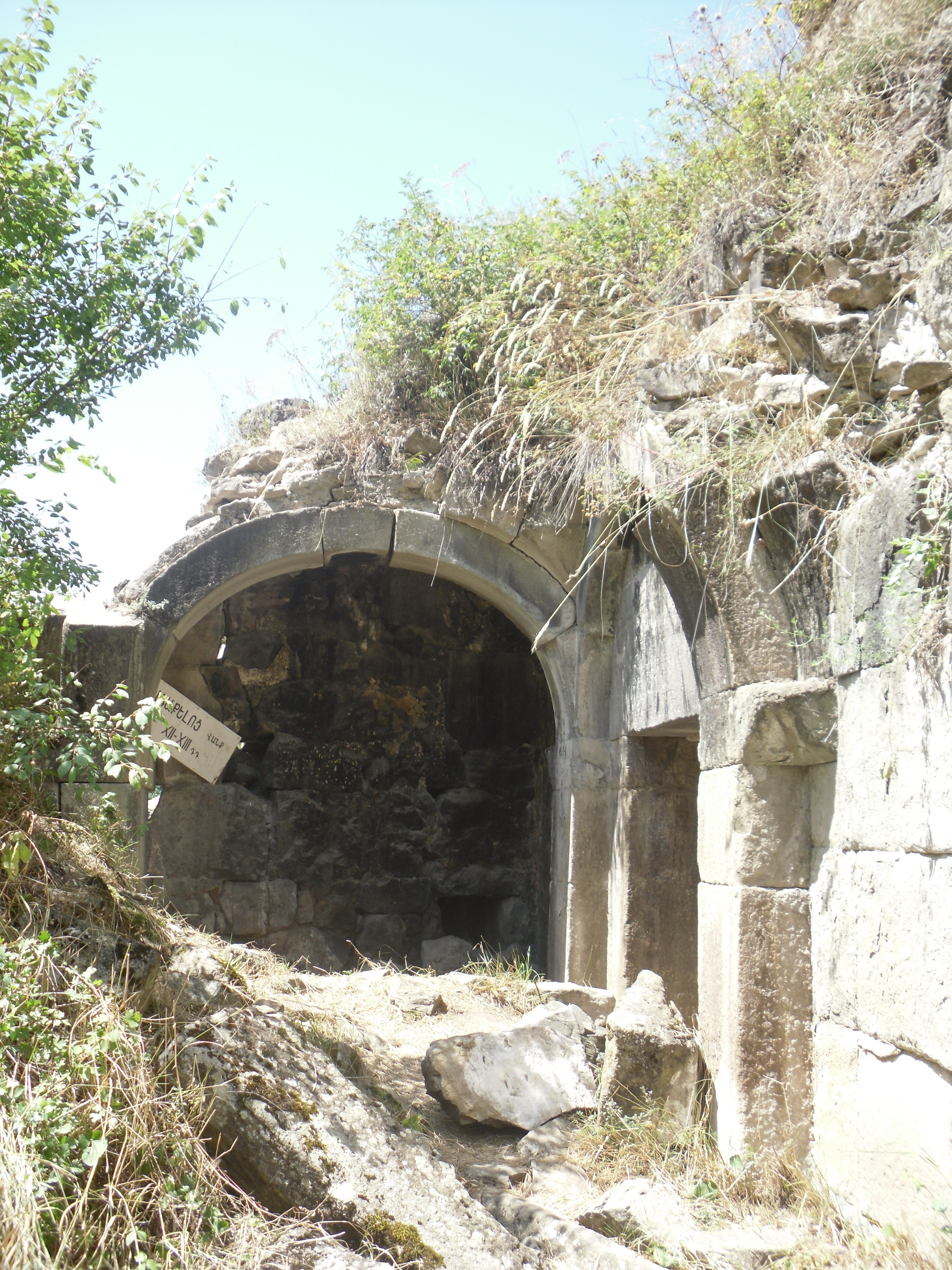 ՀՀ պատմամշակութային արգելոց-թանգարանների և պատմական միջավայրի պահպանության ծառայություն ՊՈԱԿ - Առաքելոց վանական համալիր - 8/6.12